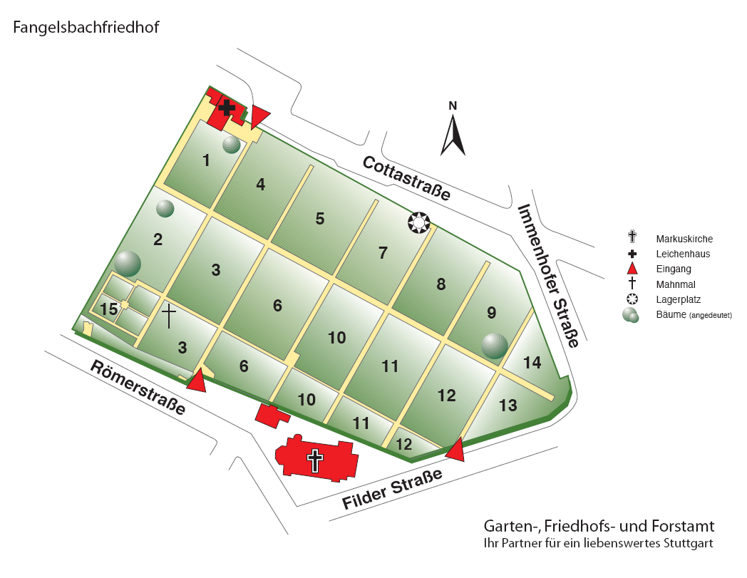 Fangelsbachfriedhof in Stuttgart-Süd Übersichtskarte